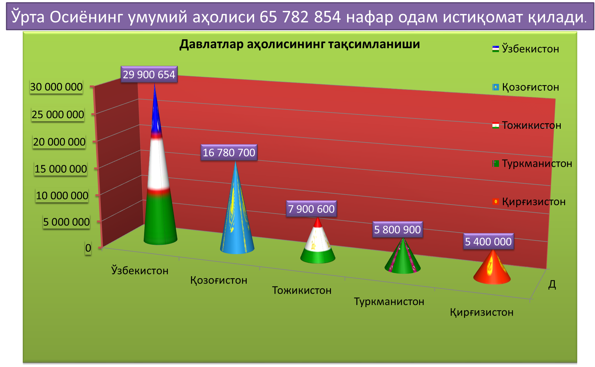 Oʻzbekcha/ўзбекча: 2012- yilda Ўрта Осиёнинг умумий аҳолиси